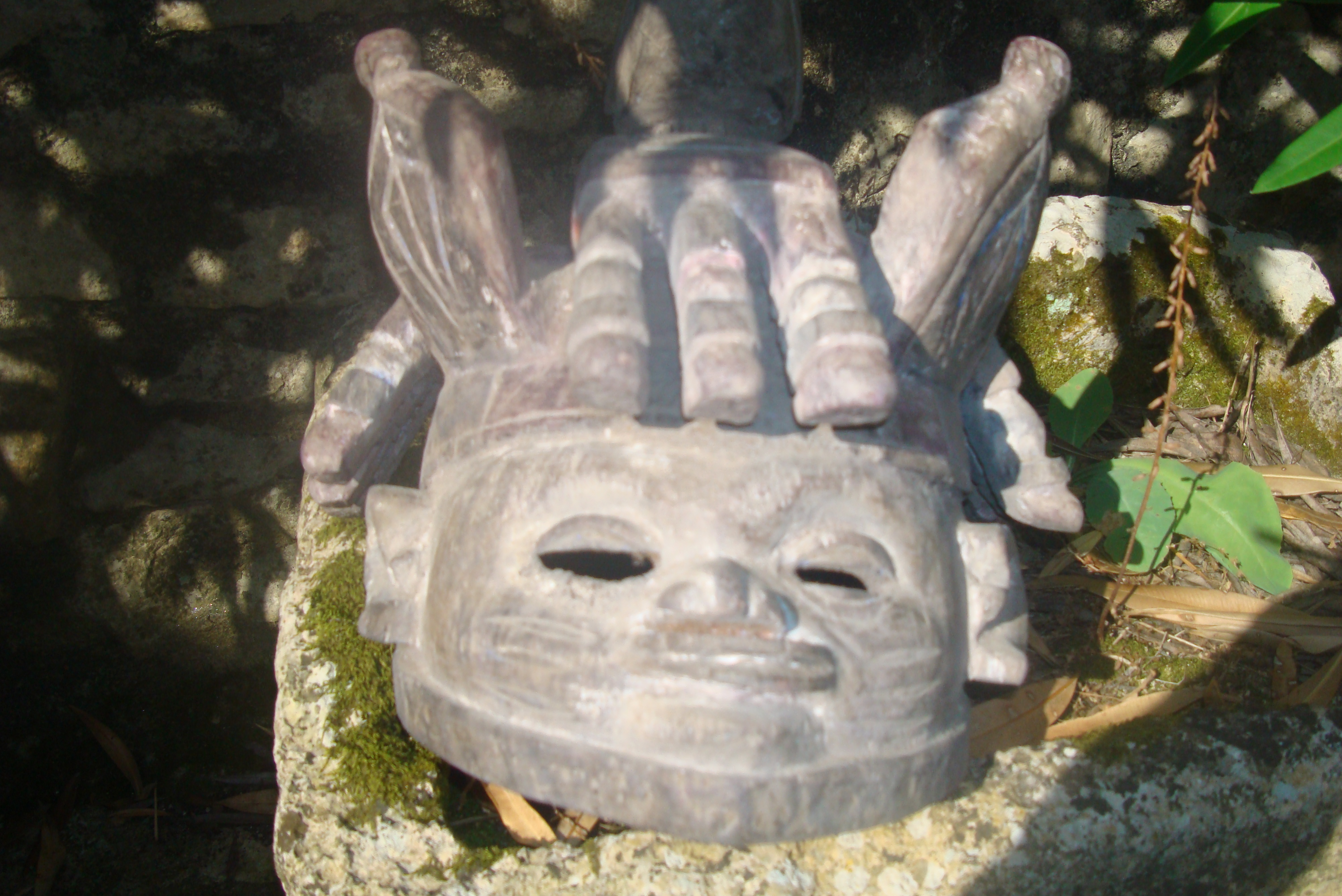 Mascara Gelede do Benim no Brasil